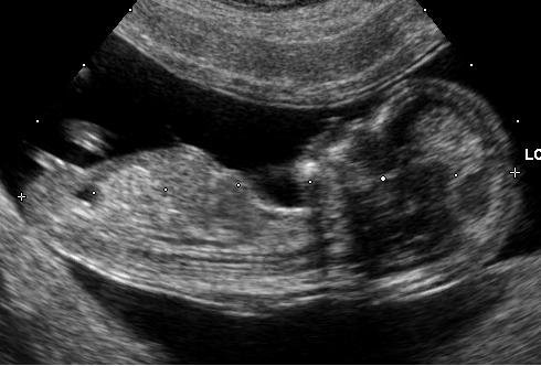 Embryon de 12 semaines.Embryo at 12 weeks.